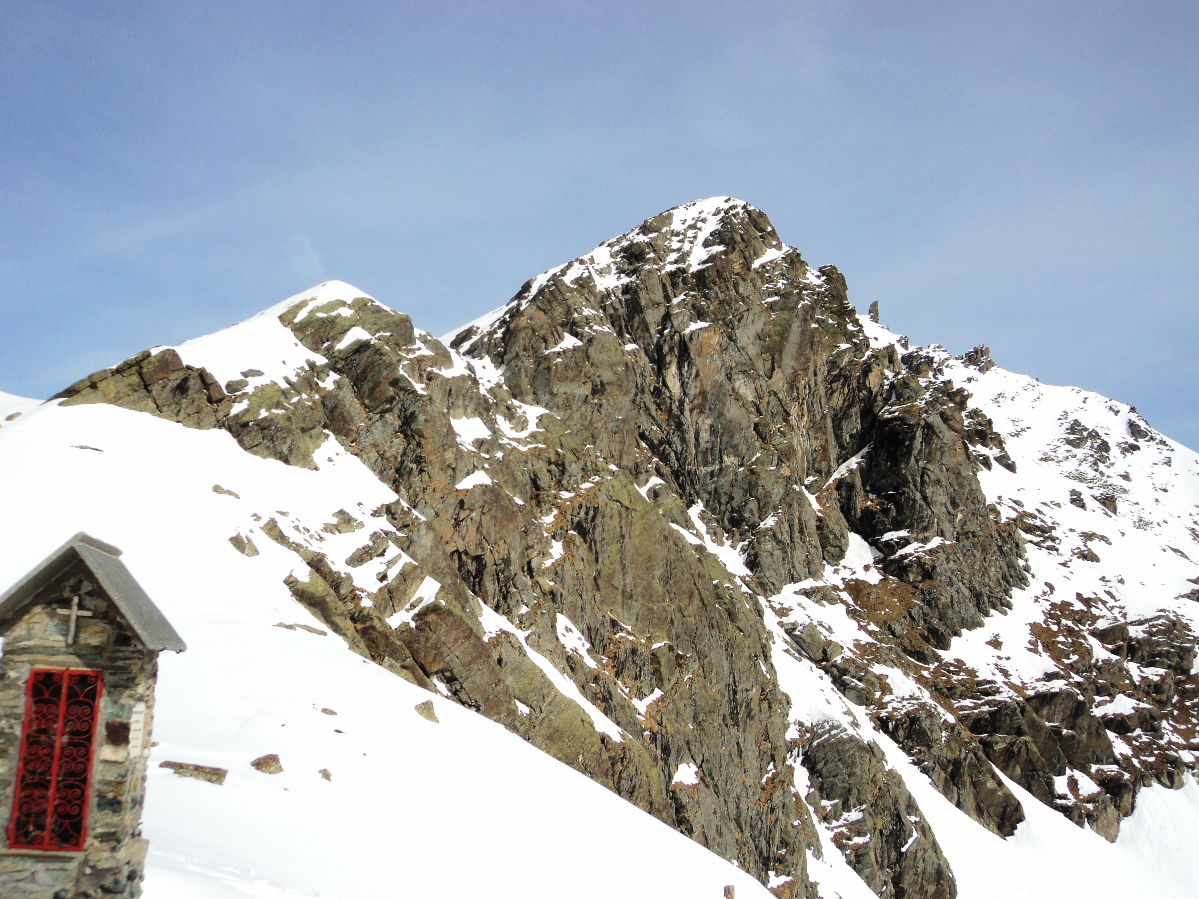 Il Viso Mozzo visto dal rifugio Quintino Sella